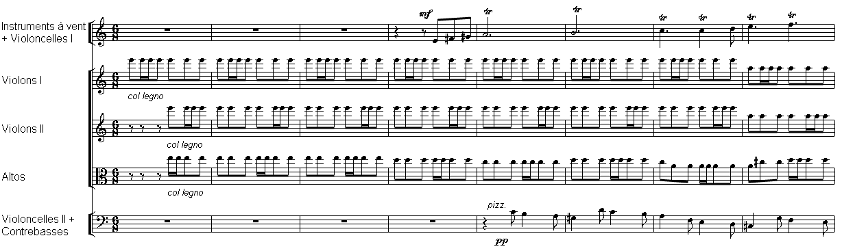 Berlioz - cordes col legno